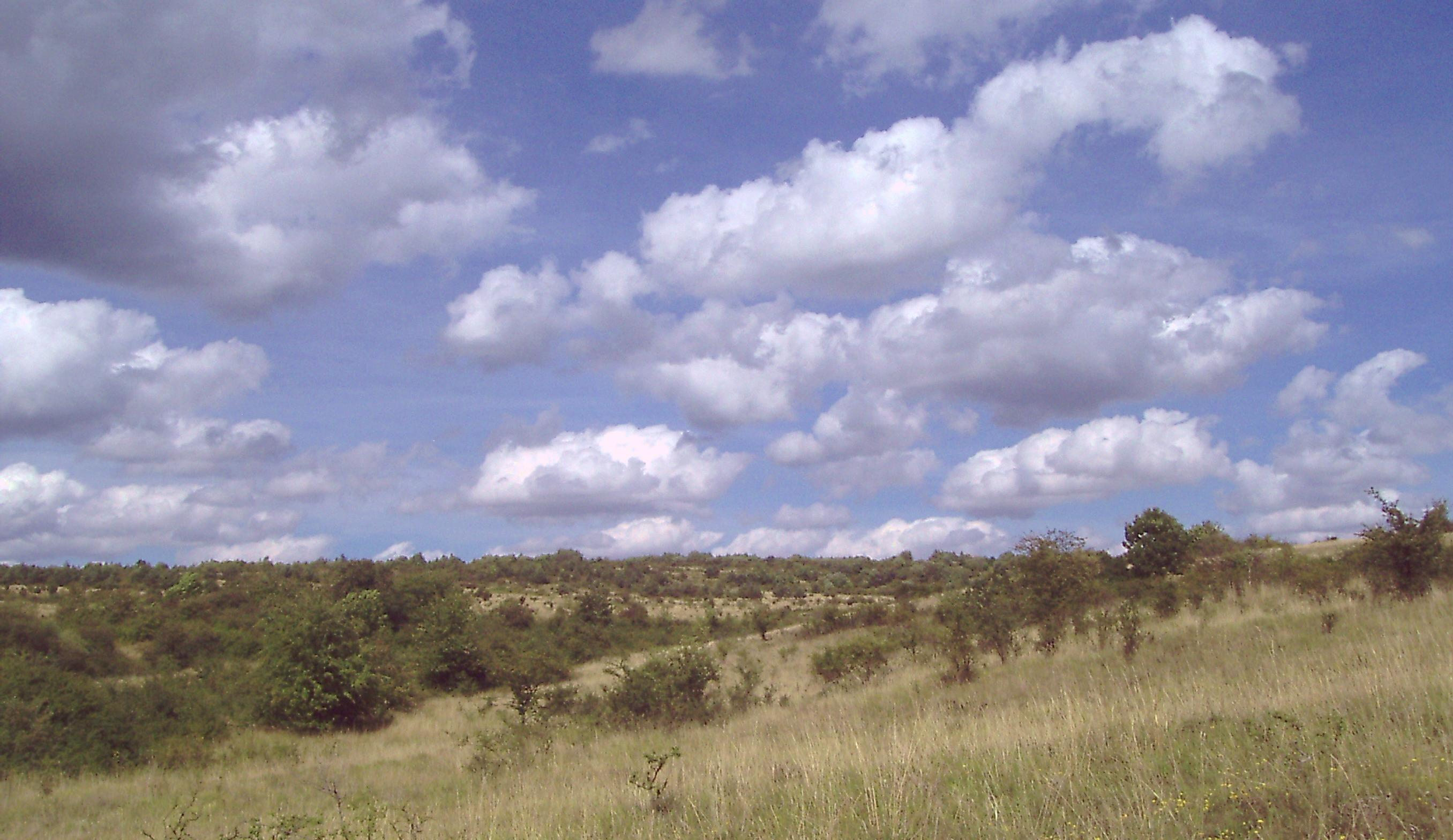 Waldsukzessionsflächen im südlichen Hainich. Am Nausterberg bei Beuernfeld sind in den dort brach gefallenen Kalkmagerrasen ausgedehnte Dorngebüsche und Pionierwälder aufgewachsen.